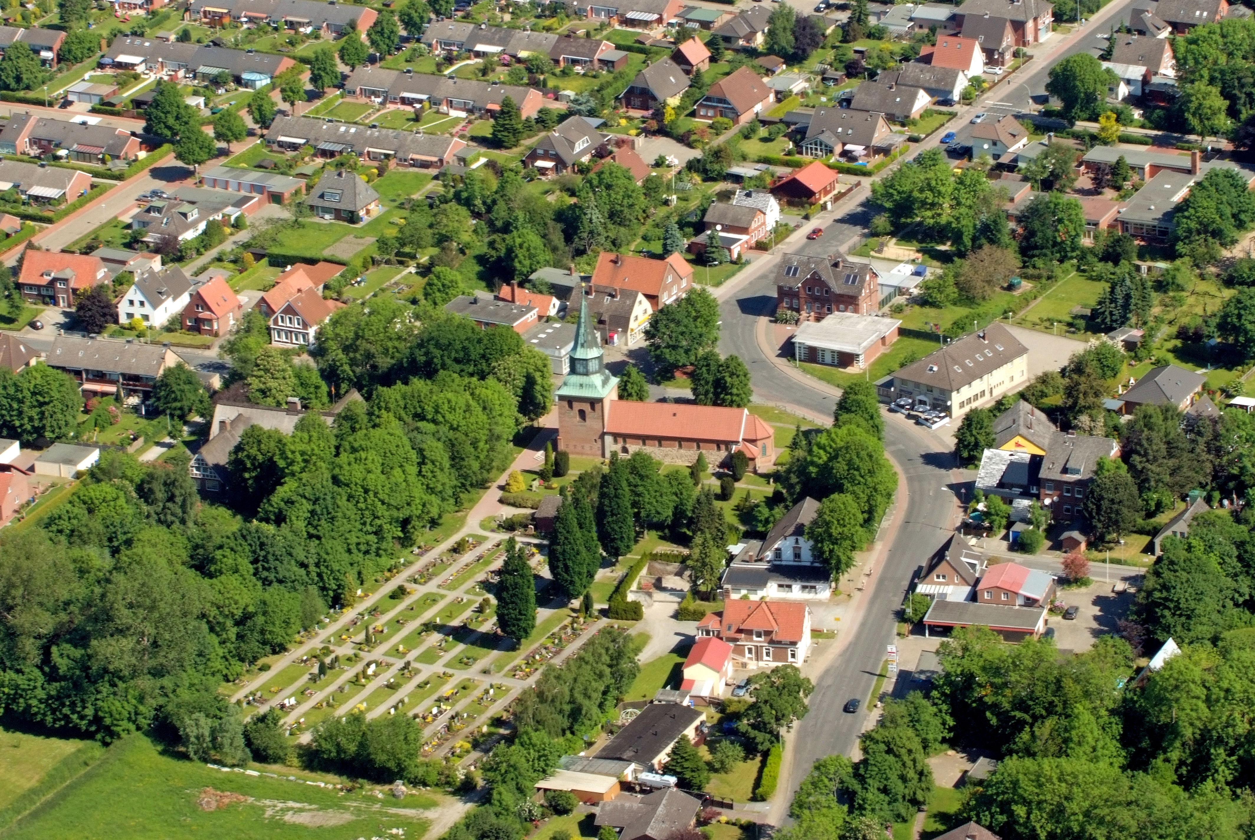 St. Abundus-Kirche, Cuxhaven-Groden Fotoflug vom Flugplatz Nordholz-Spieka über Cuxhaven und Wilhelmshaven